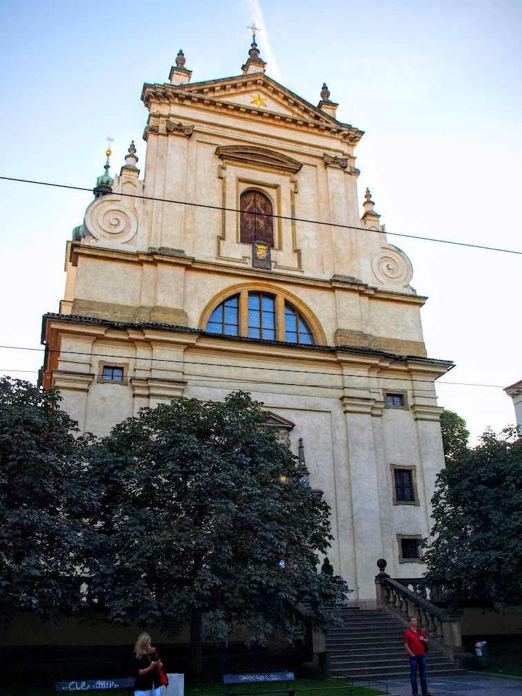 Kostel Panny Marie Vítězné a svatého Antonína z Padovy